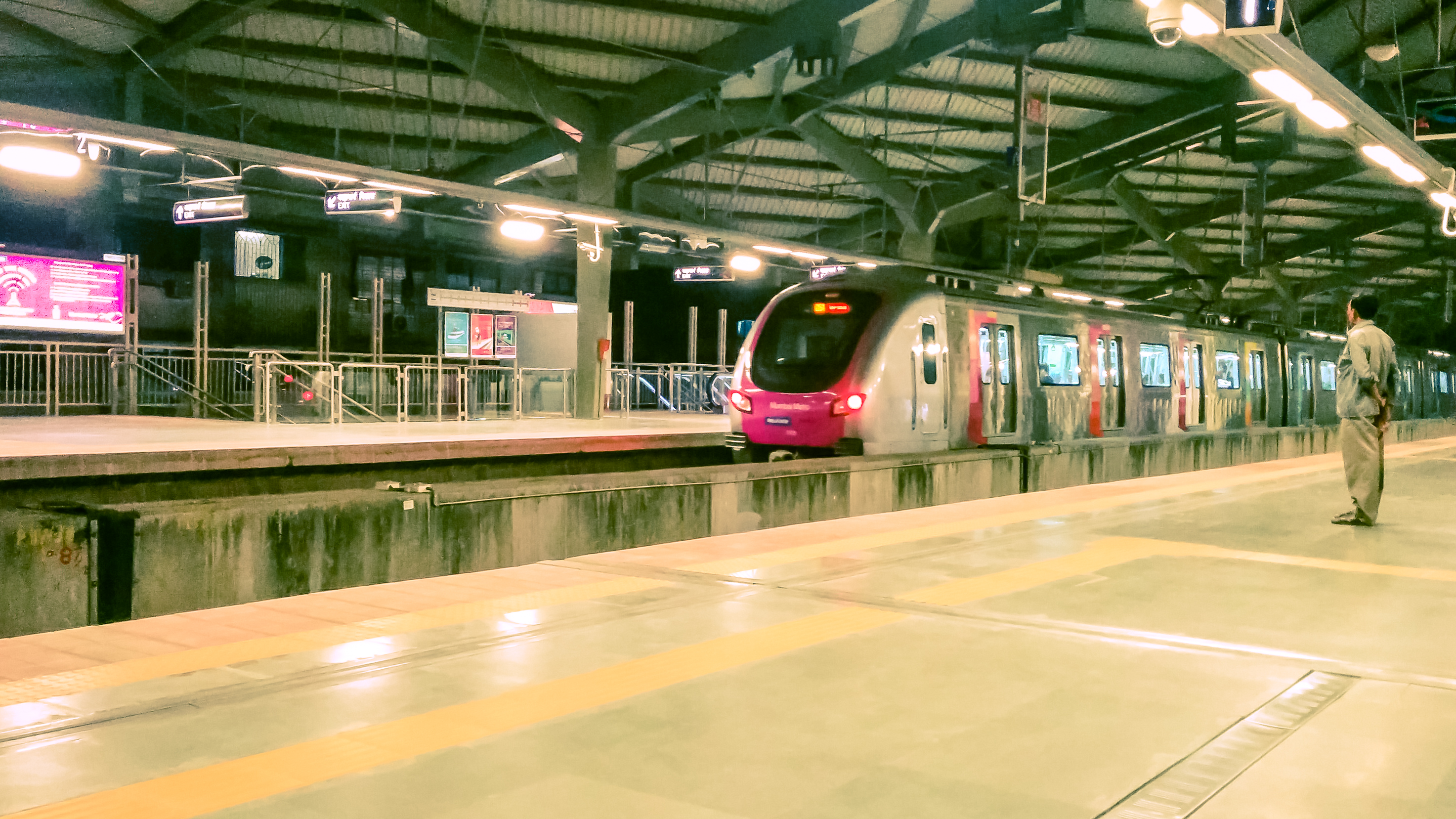 Metro Mumbai "Azad Nagar" Azad Nagar